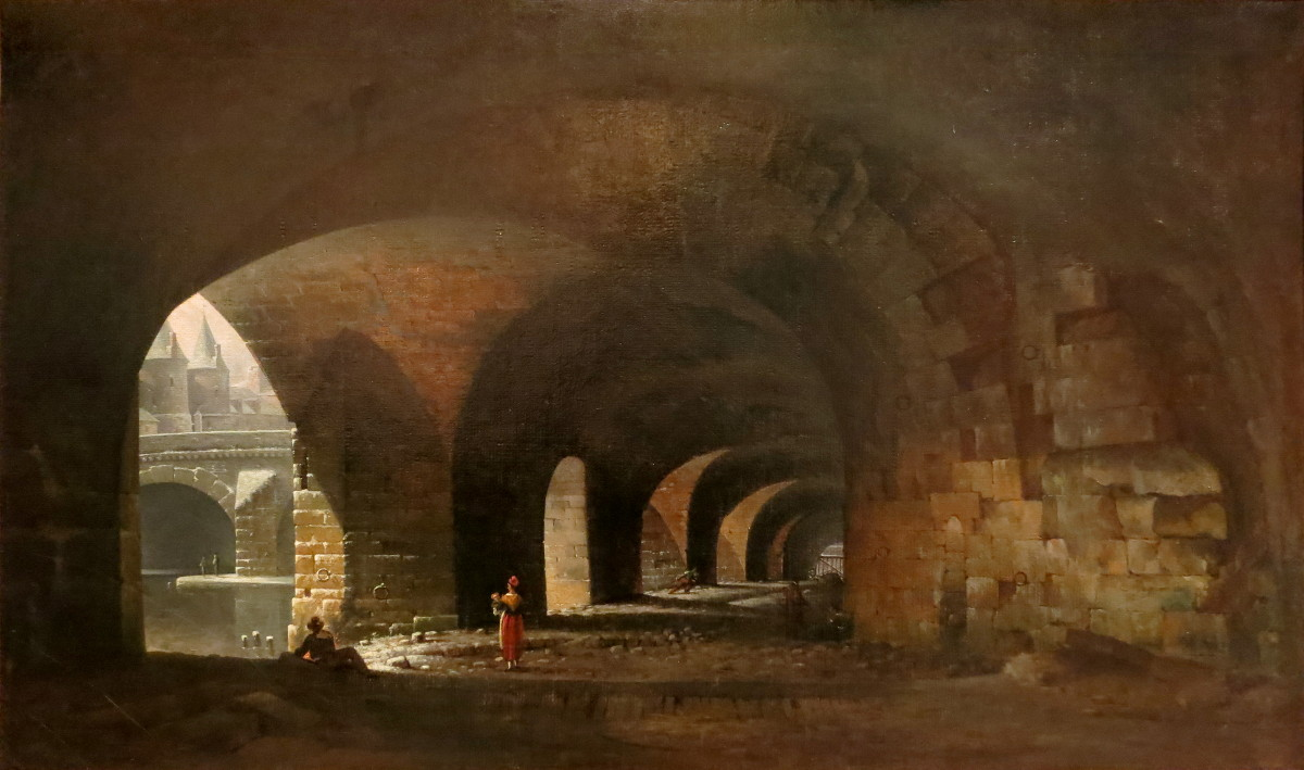 La voûte du quai de Gesvres située à Paris entre le pont Notre-Dame et le pont au Change et construite en 1643